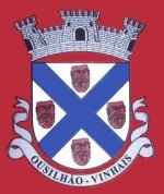 BrasÃ£o de OusilhÃ£o. Criada no GIMP a partir de uma fotografia digital de um estandarte.